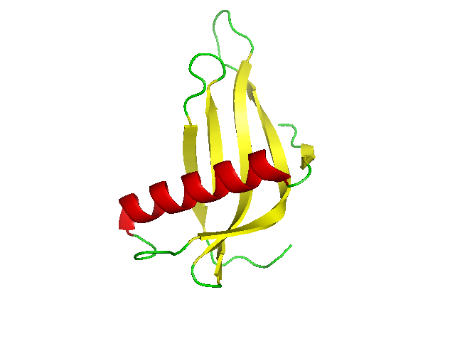 Monellin